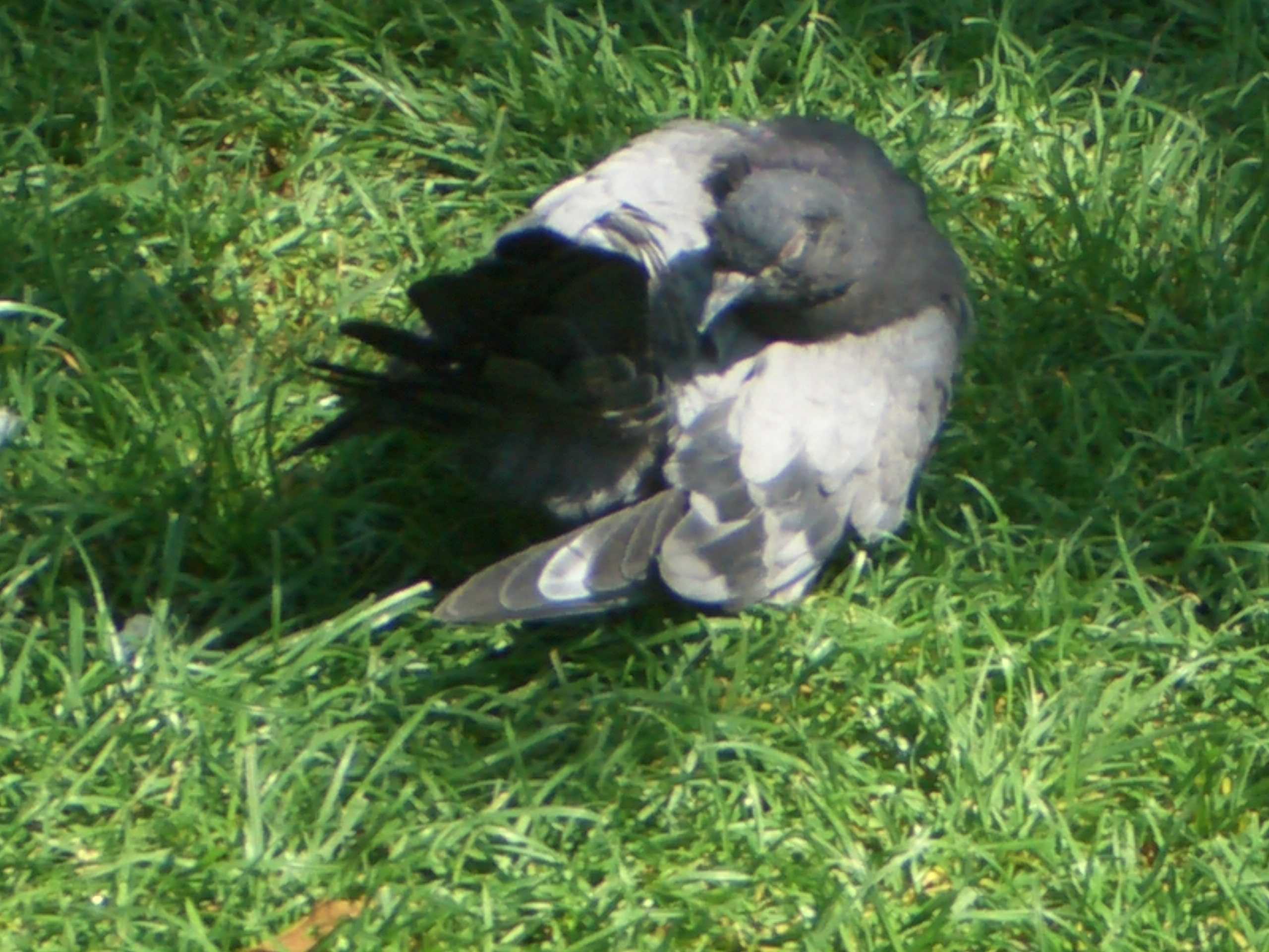 Ankara'da güvercinler.